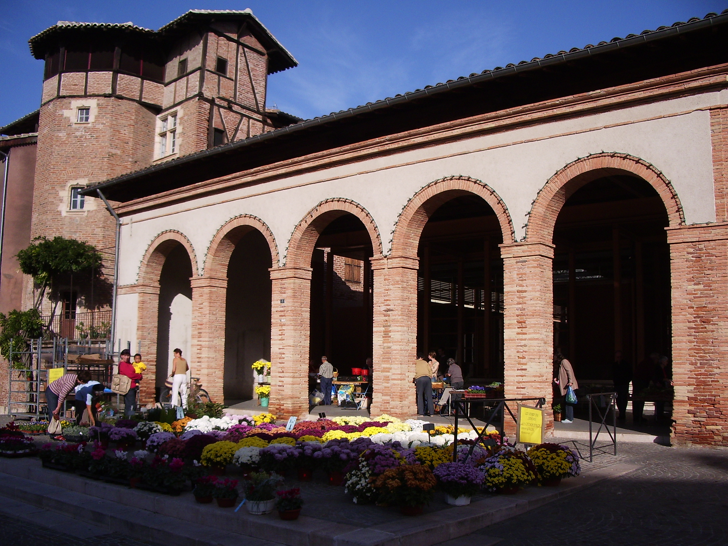 Gaillac, dans le Tarn, en France. Place du Griffoul